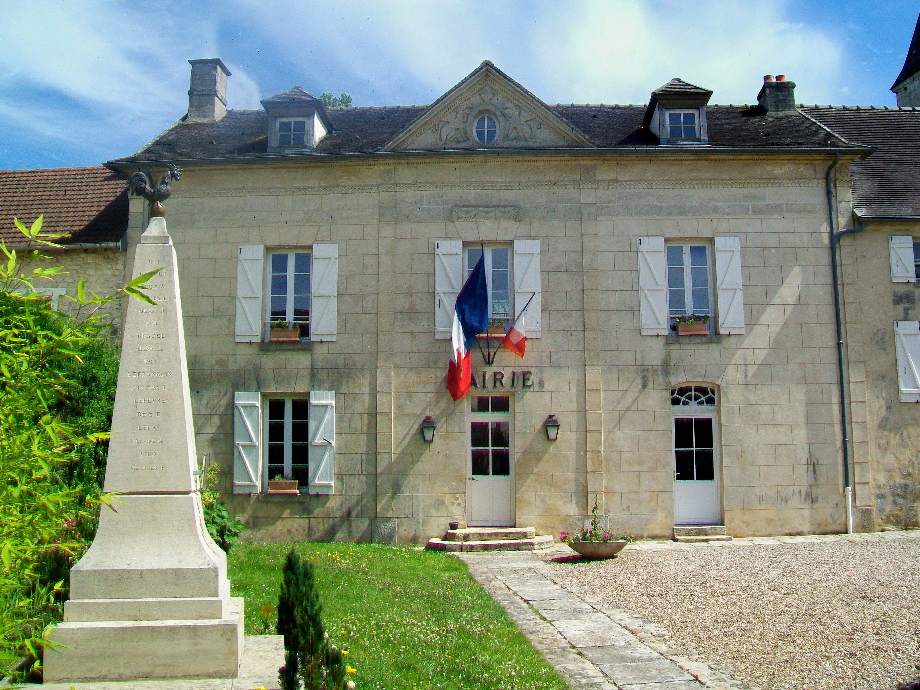 La mairie et le monument aux morts.